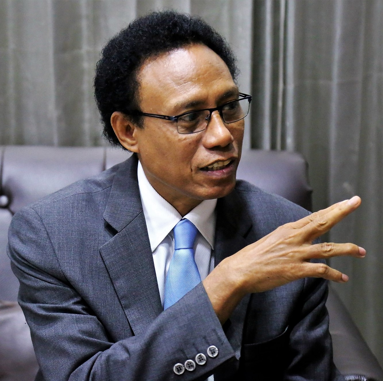 Joaquim Amaral